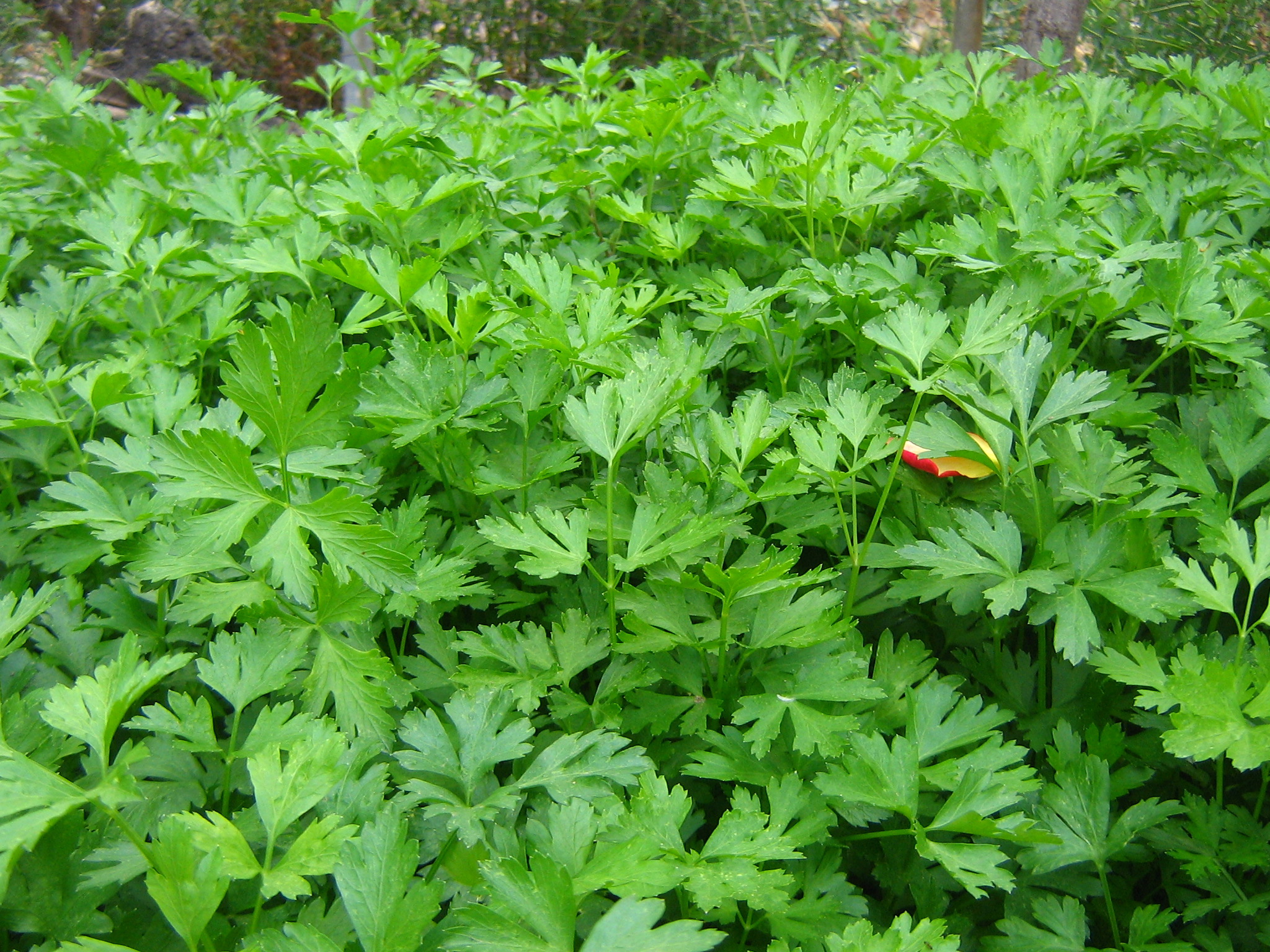 Ο μαϊντανός (Petroselinum crispum) Ο μαϊντανός είναι ένα φυτό διετές και ανήκει στο γένος Petroselinum crispum της οικογένειας Σκιαδιοφόρα – Umbelliferae. Είναι ένα λαχανικό με ιδιαίτερο άρωμα και εντυπωσιακό φύλλωμα. Καλλιεργείται σε περιοχές εύκρατες για τα φύλλα του, τα οποία μπορούν να χρησιμοποιηθούν στη μαγειρική αλλά και σε σαλάτες.